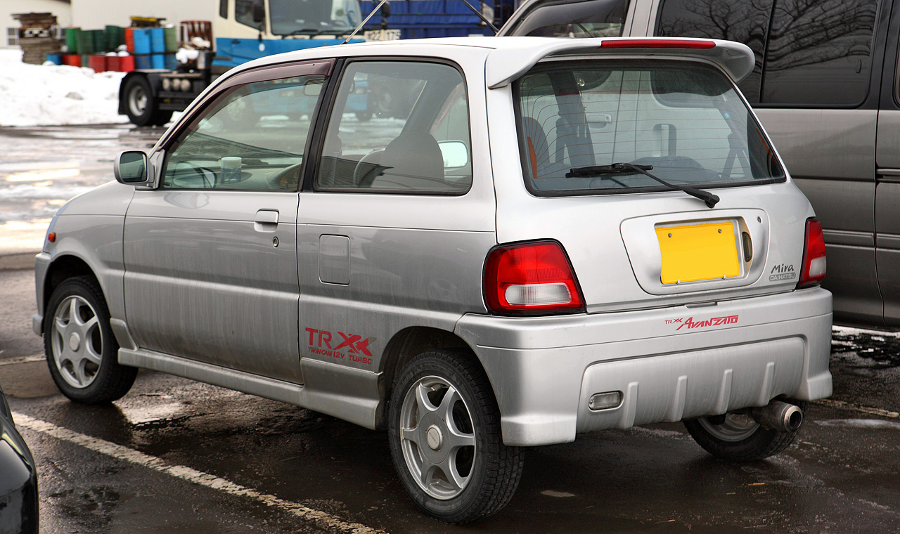 Daihatsu Mira 660 Tutbo TR-XX Avanzato R ( L502S )